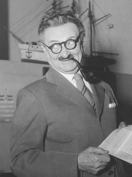 Gilberto Govi in Colpi di timone